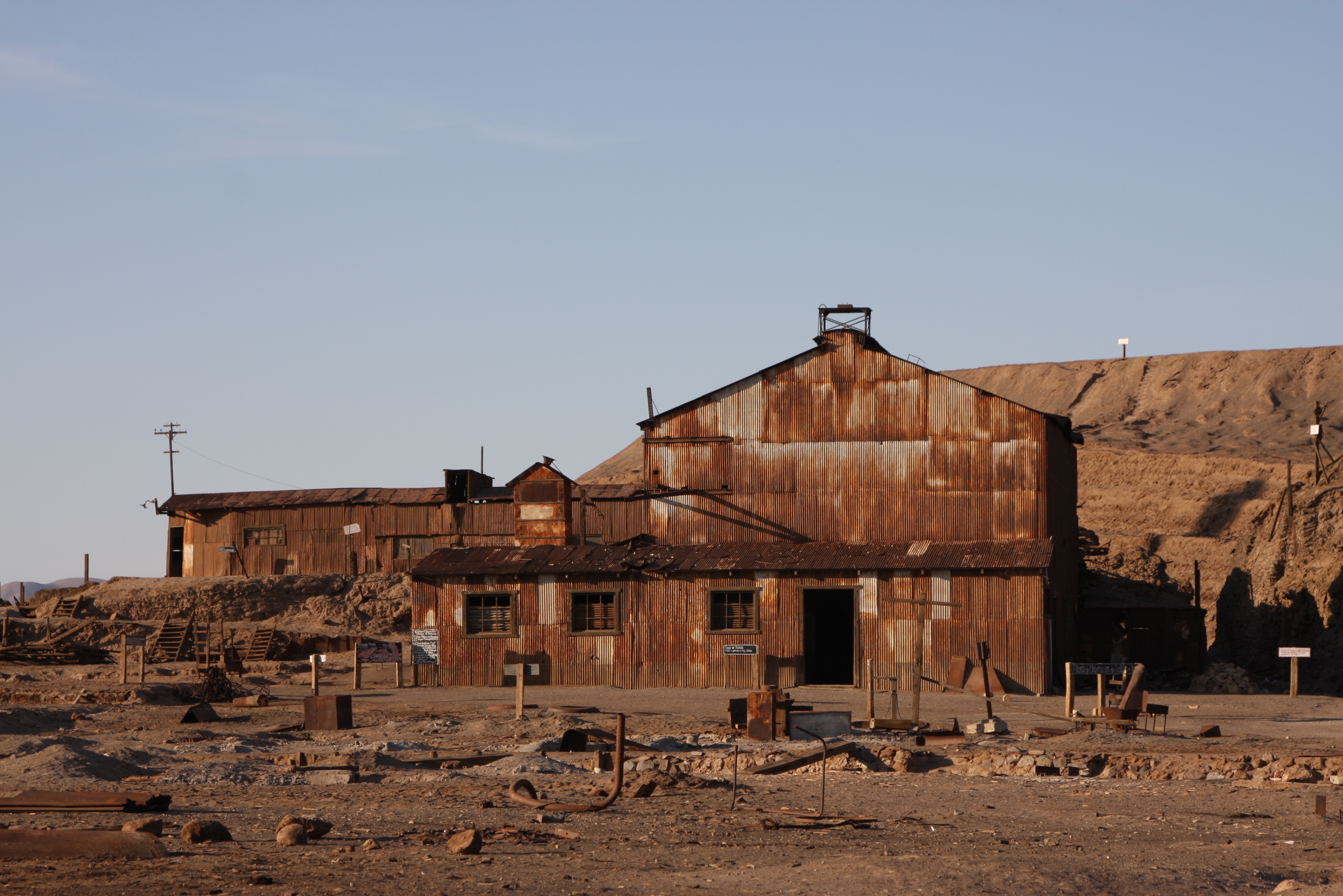 Humberstone 2